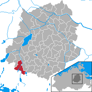 Faulenrost, Landkreis Demmin, Mecklenburg-Vorpommern